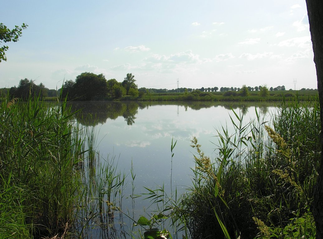 Jezioro na Kujawach